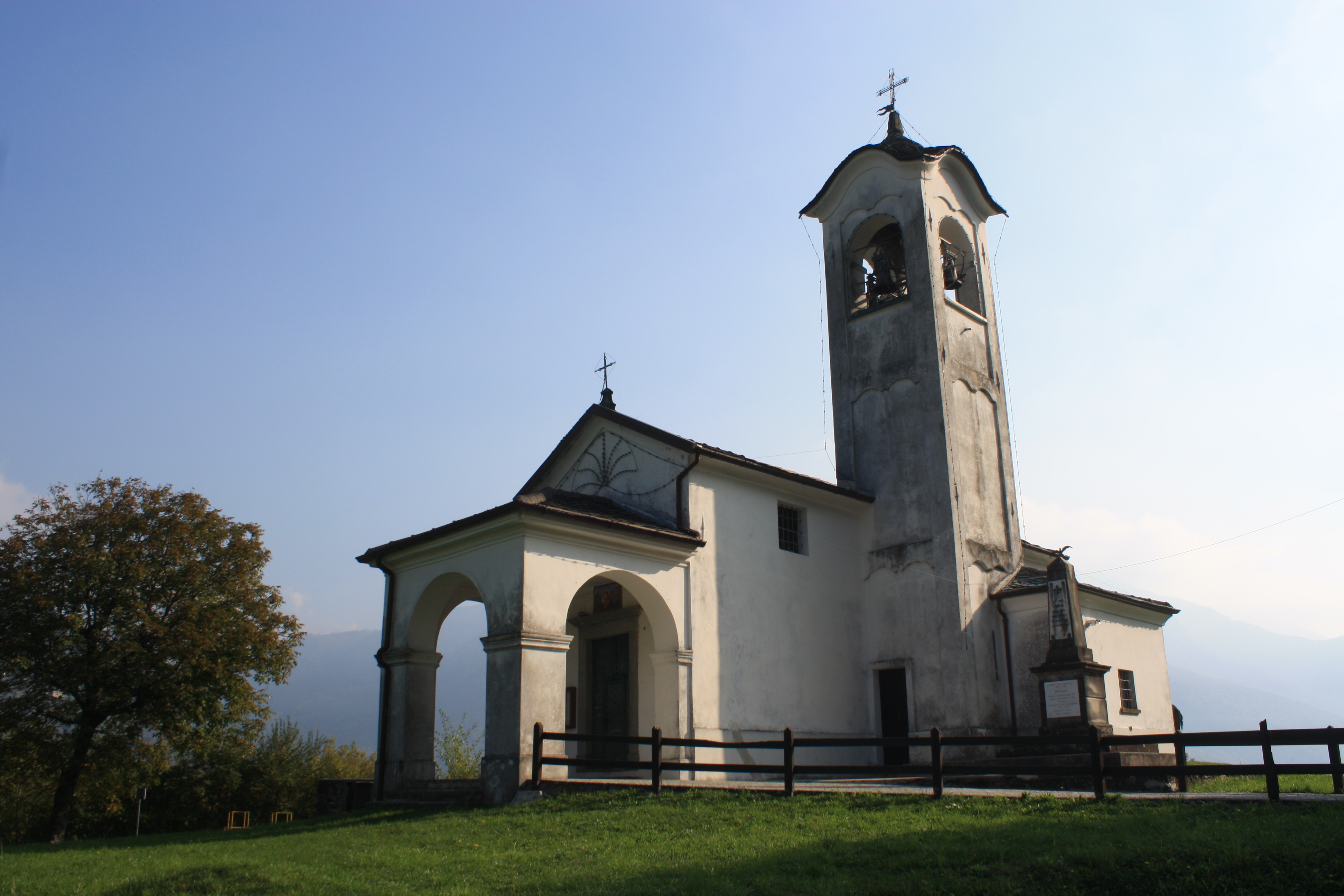 La chiesa di Sant'Antonio abate a Parlasco.